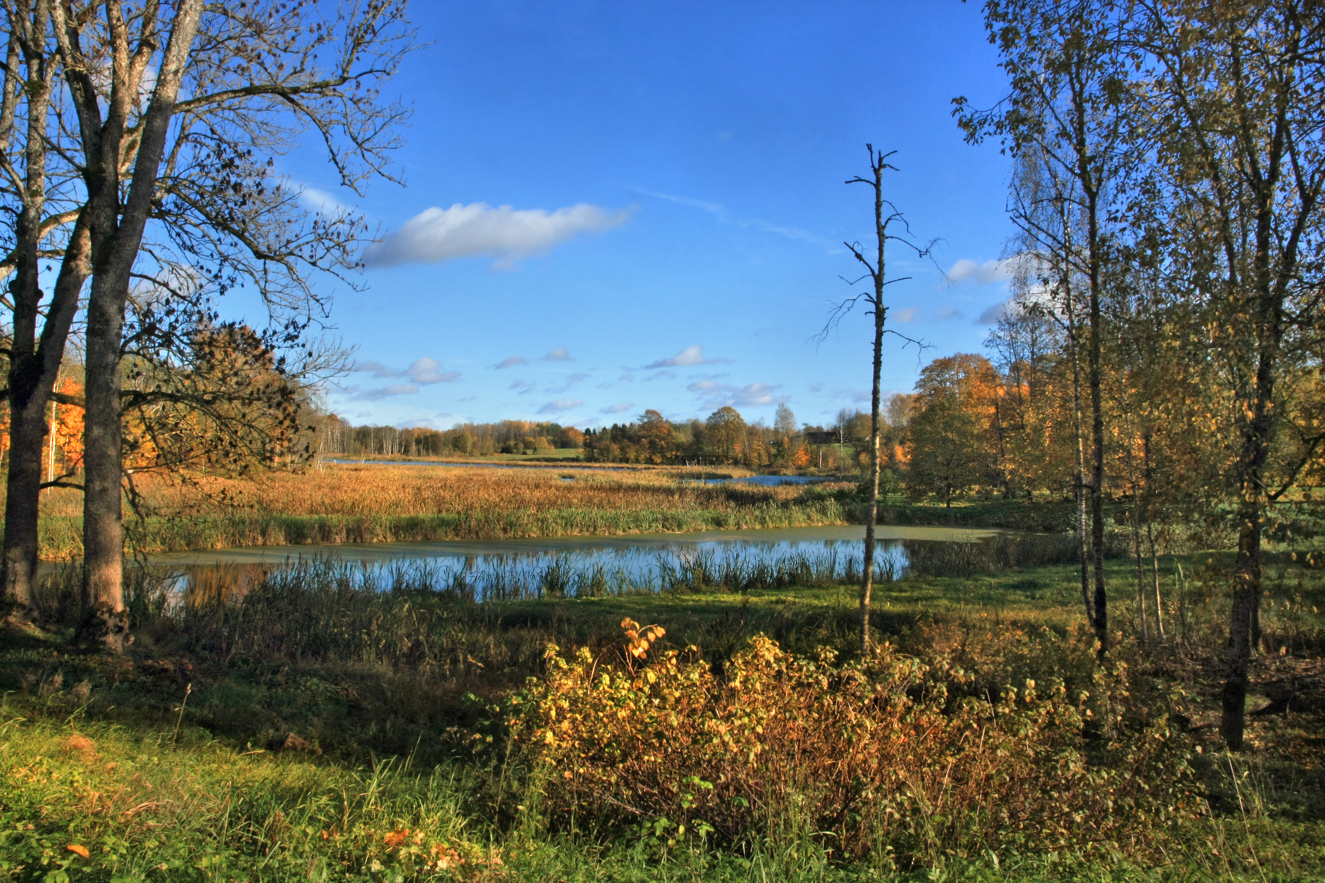 Härmajärve kaldapealne Ruusmäe külas